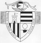 Stemma Genaro Codina Zacatecas